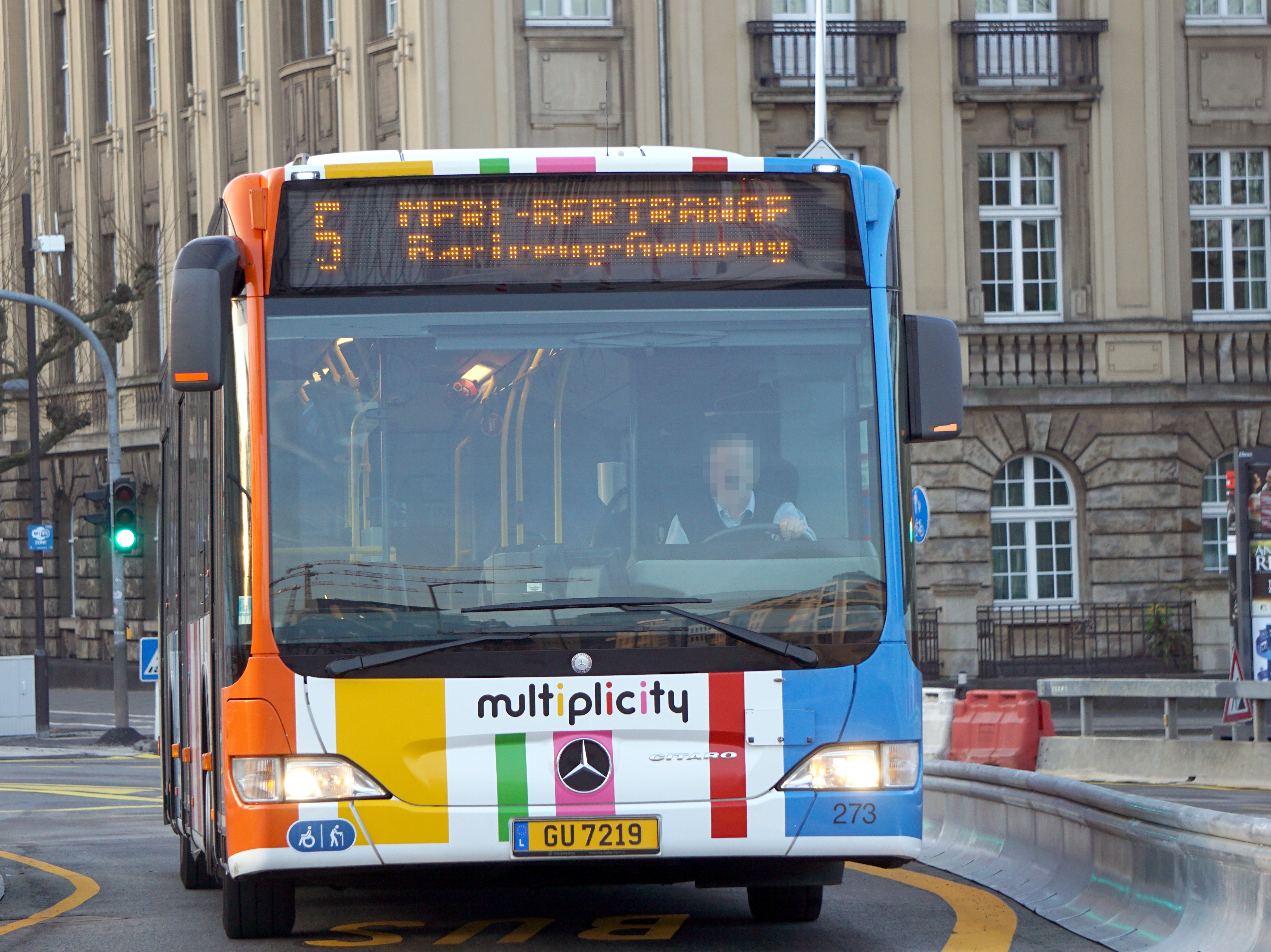 Lëtzebuerg, AVL Bus 273, Linn 5 op der Metzerplaz a Richtung Bartreng